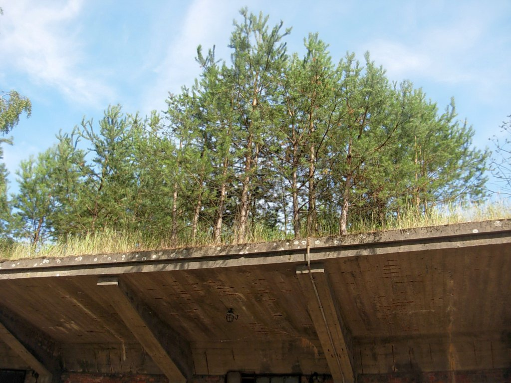 Pozostałości po DAG Fabrik Bromberg